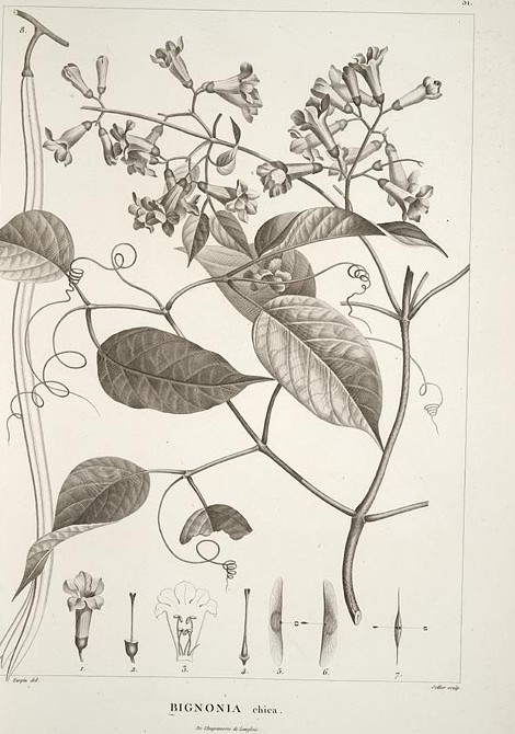 Arrabidaea chica (syn. Bignonia chica). Plantes équinoxiales recueillies au Mexique : dans l'île de Cuba, dans les provinces de Caracas, de Cumana et de Barcelone, aux Andes de la Nouvelle Grenade, de Quito et du Pérou, et sur les bords du rio-Negro de Orénoque et de la rivière des Amazones. Voyage de Humboldt et Bonpland.